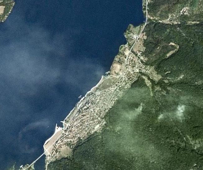 Satellitenaufnahme des Dorfes Tekija in der Gemeinde Kladovo in Serbien.